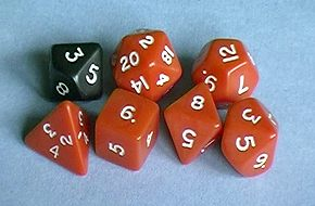 Hrací kostky užívané ve stolních RPG hrách. Zdroj: polská wikipedie - :pl:Image:LMPogodaTypowyZestawKosciDoRPG.jpg Autor: Łukasz M. Pogoda